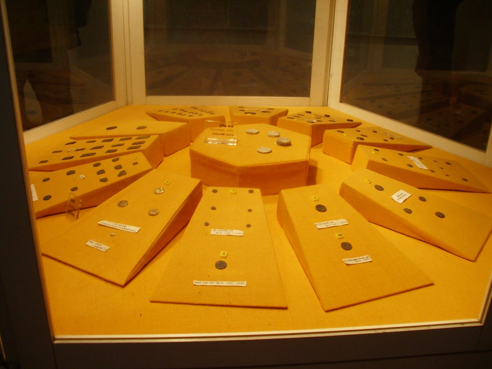 Monedes del regne d'Anuradhapura al museu arqueologic de la ciutat, foto feta per J. Ollé el juliol del 2006